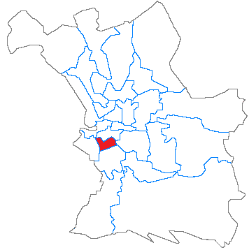 Situation du canton dans la ville de Marseille